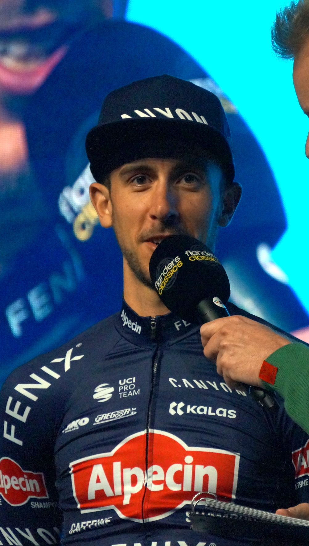 Dries De Bondt bij de ploegenvoorstelling in Gent voor de Omloop Het Nieuwsblad 2020